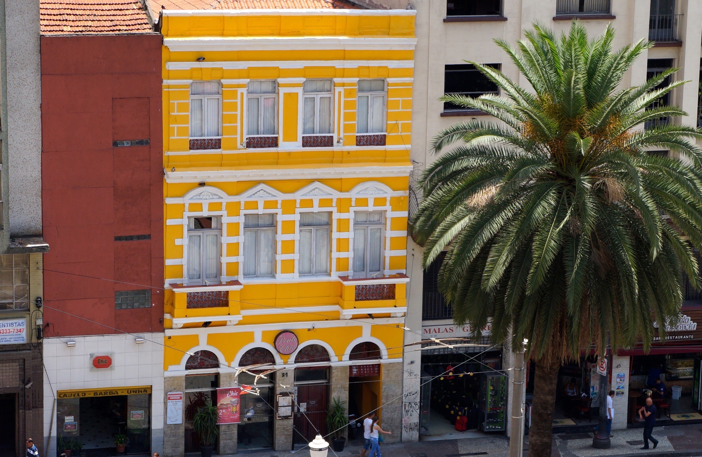 Fachada Ponto Chic Paissandu São Paulo